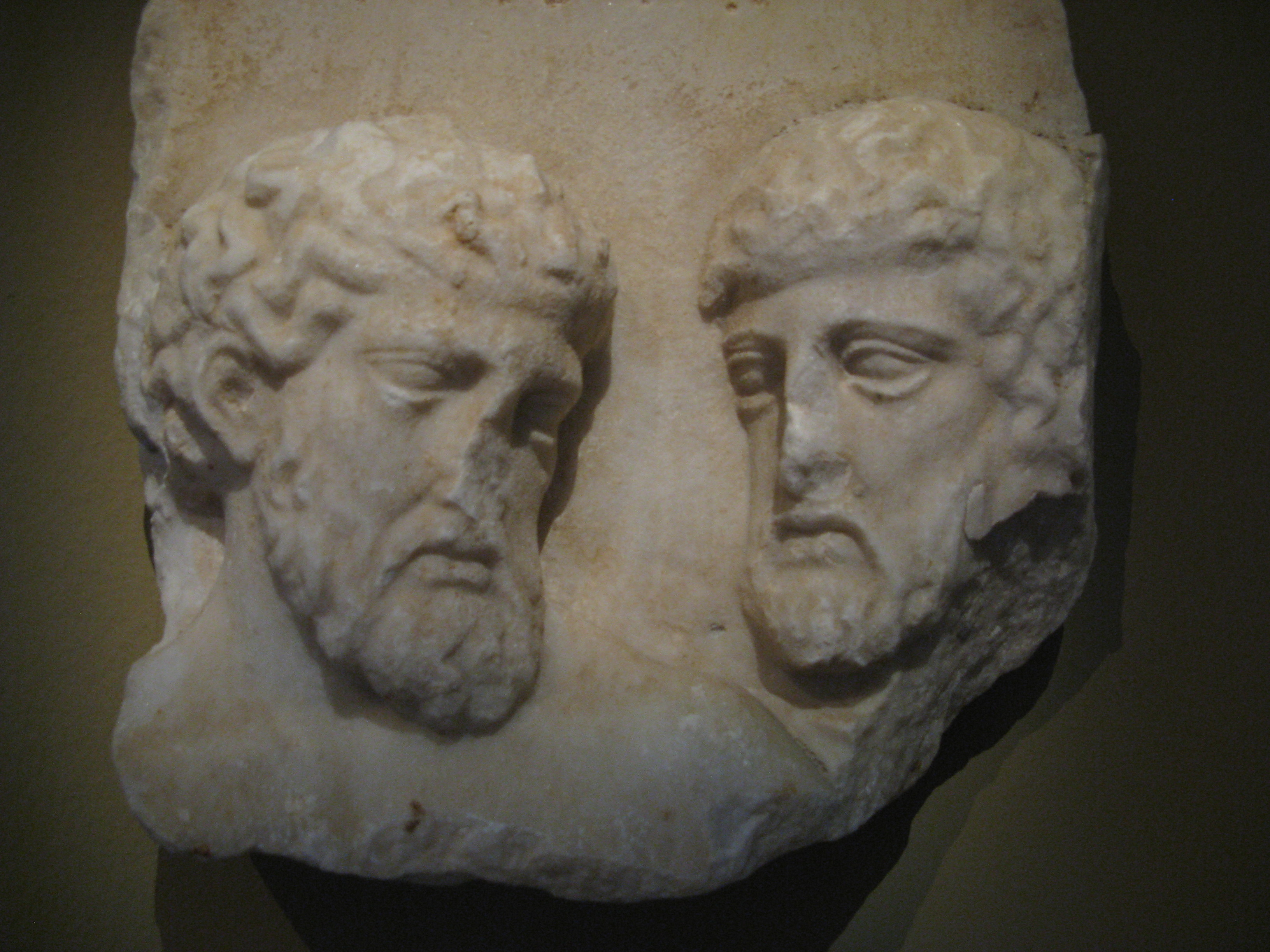 Fragmente vom nordfries des Parthenon.